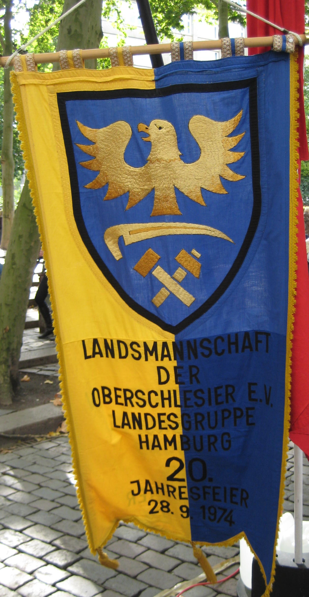 Fahne der Landsmannschaft der Oberschlesier, Landesgruppe Hamburg, am 4. Oktober 2008 in Hamburg